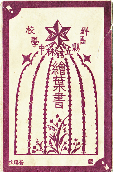 Ｓ２館中絵葉書